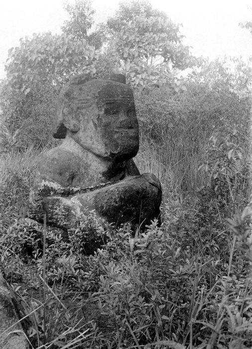 Negatief. Megalitisch beeld aan de weg van Kp. Poelauping naar Kp. Tinggihari